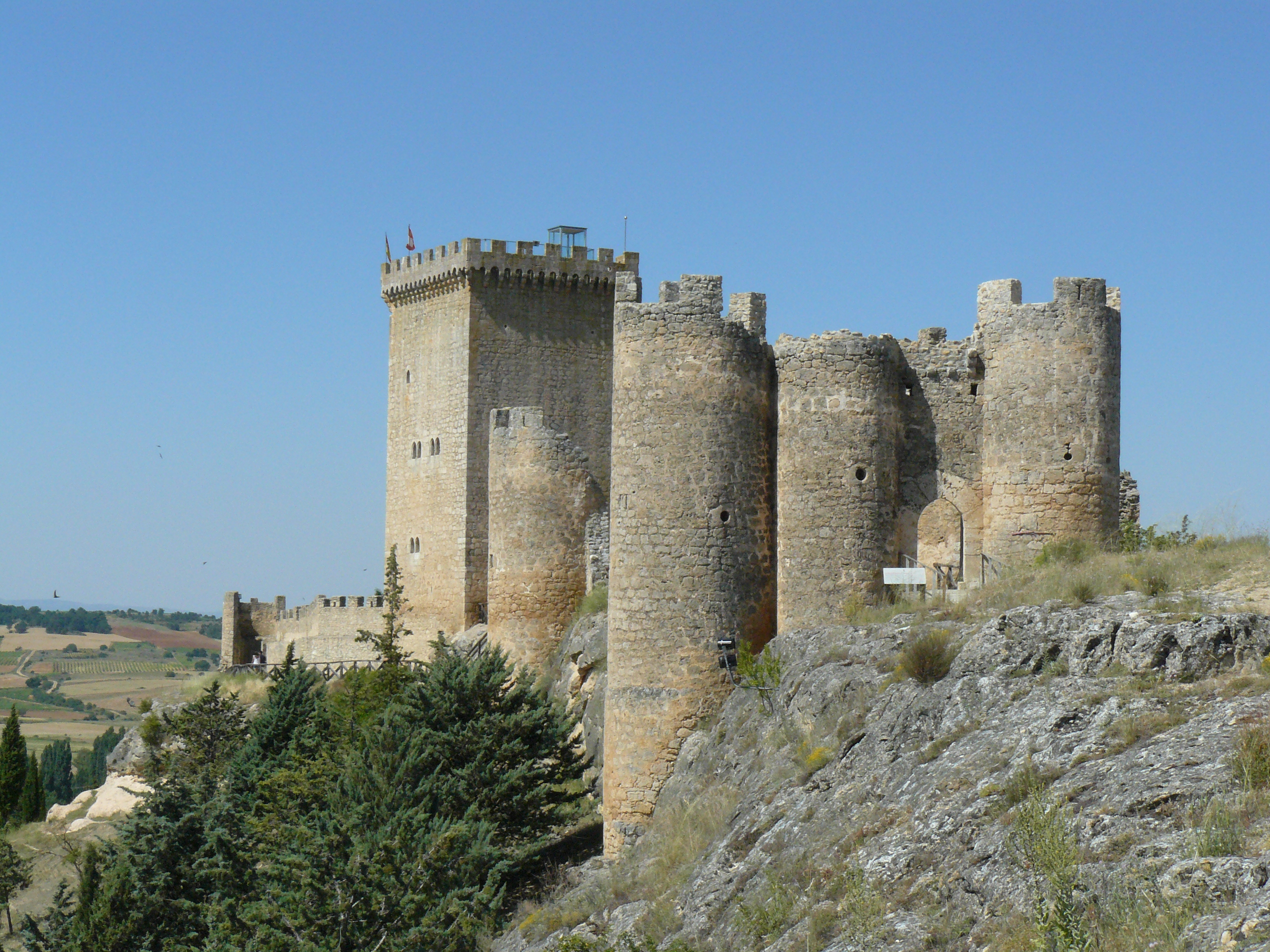 Castillo de Peñaranda de Duero, Burgos.